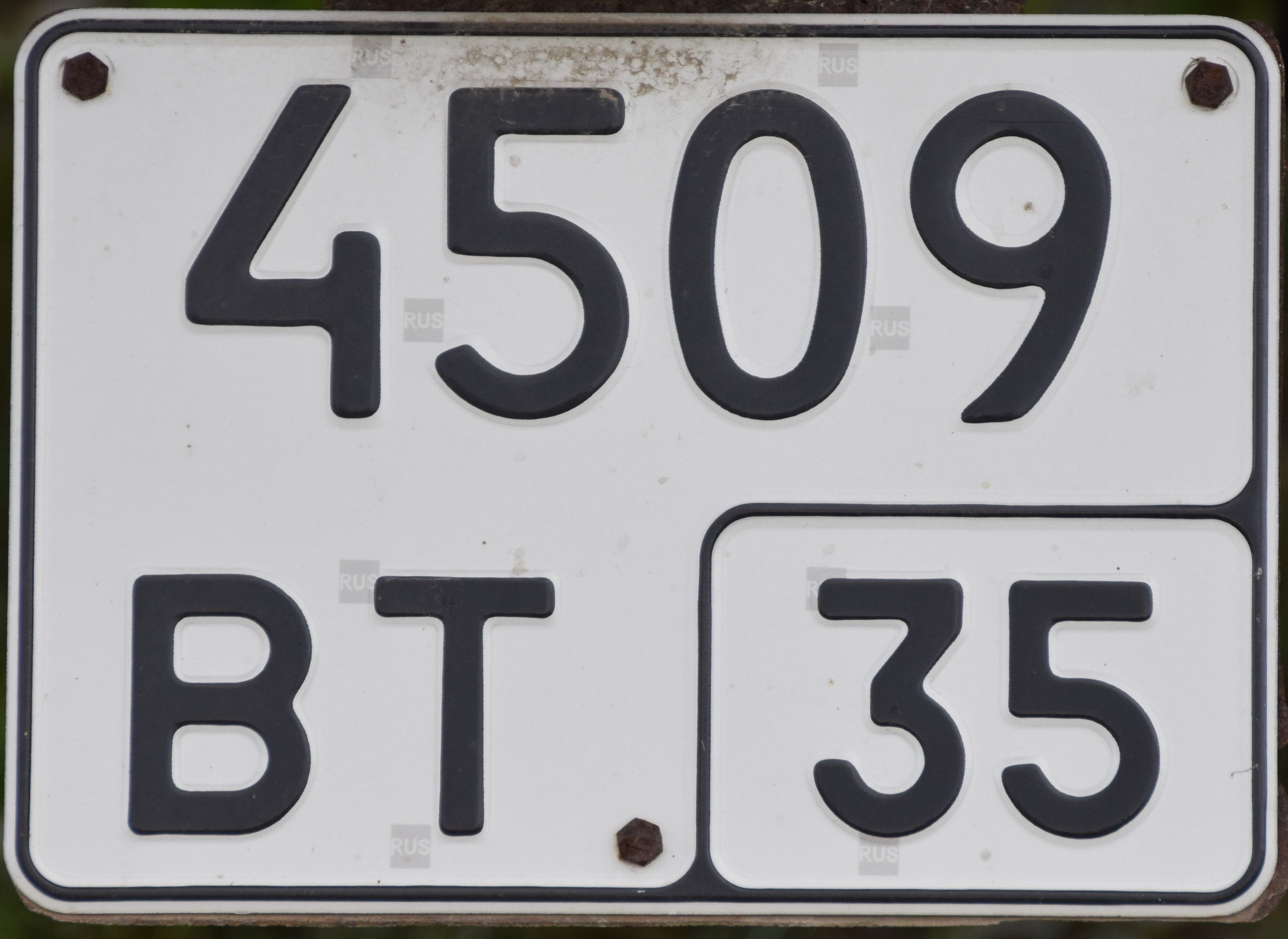 Russische kentekenplaat vvoor tractoren